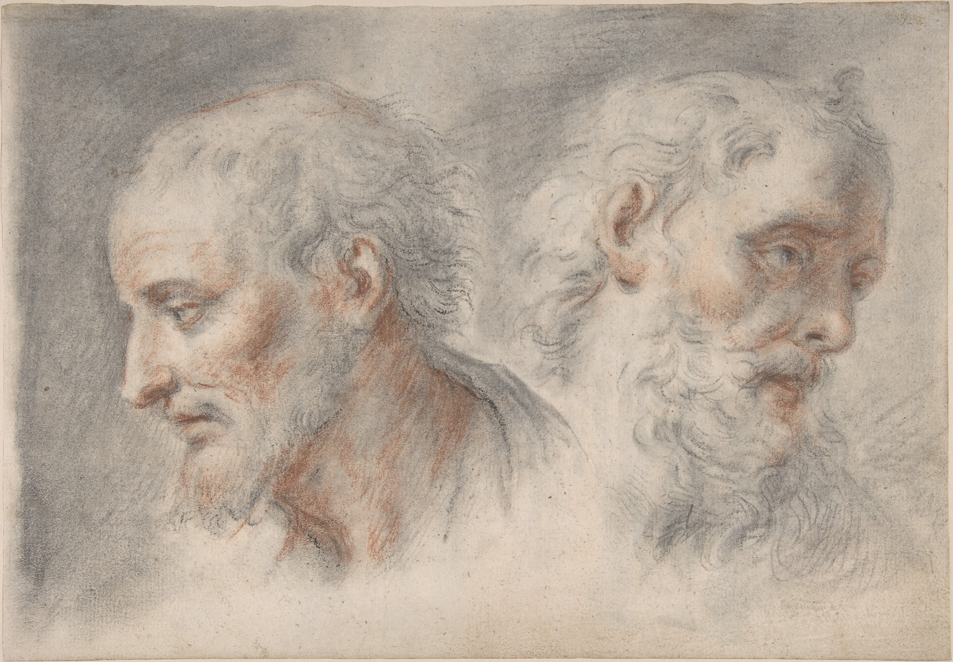 Drawing; Drawings